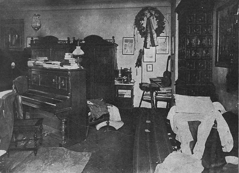 Sypialnia po śmierci dr. Włodzimierza Lewickiego. Za pianinem obk fotela widoczne ciało mecenasa.